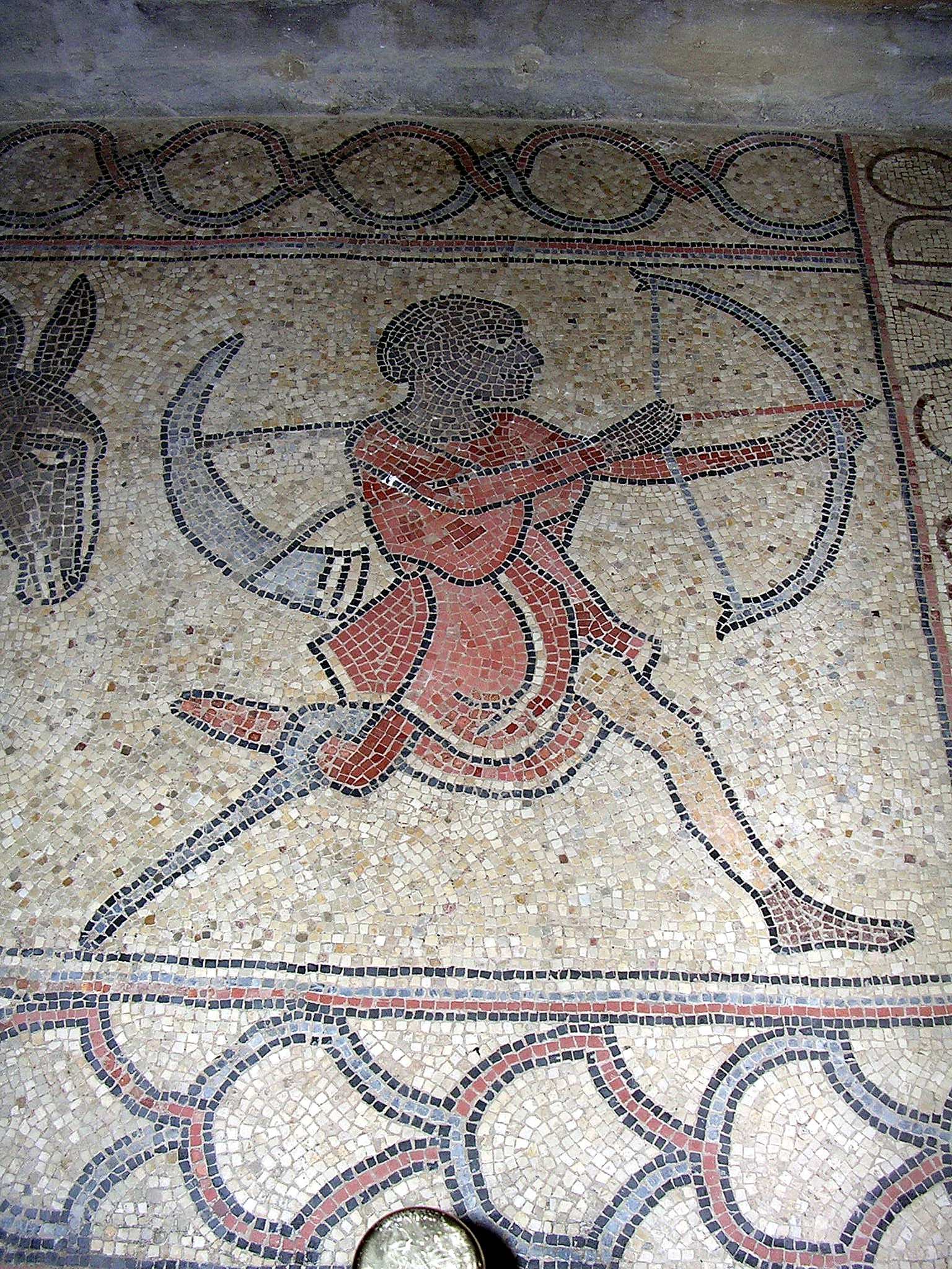 Mosaïques du XIIe siècle de la cathédrale de Lescar